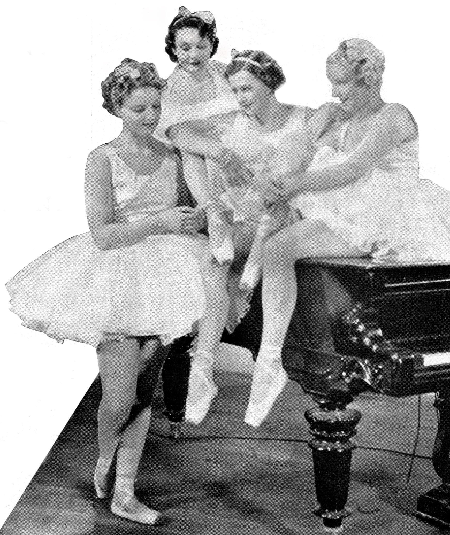 Fotogramma di Ballerine, regia G Macathy prod AFI Tirrenia (It) 1936